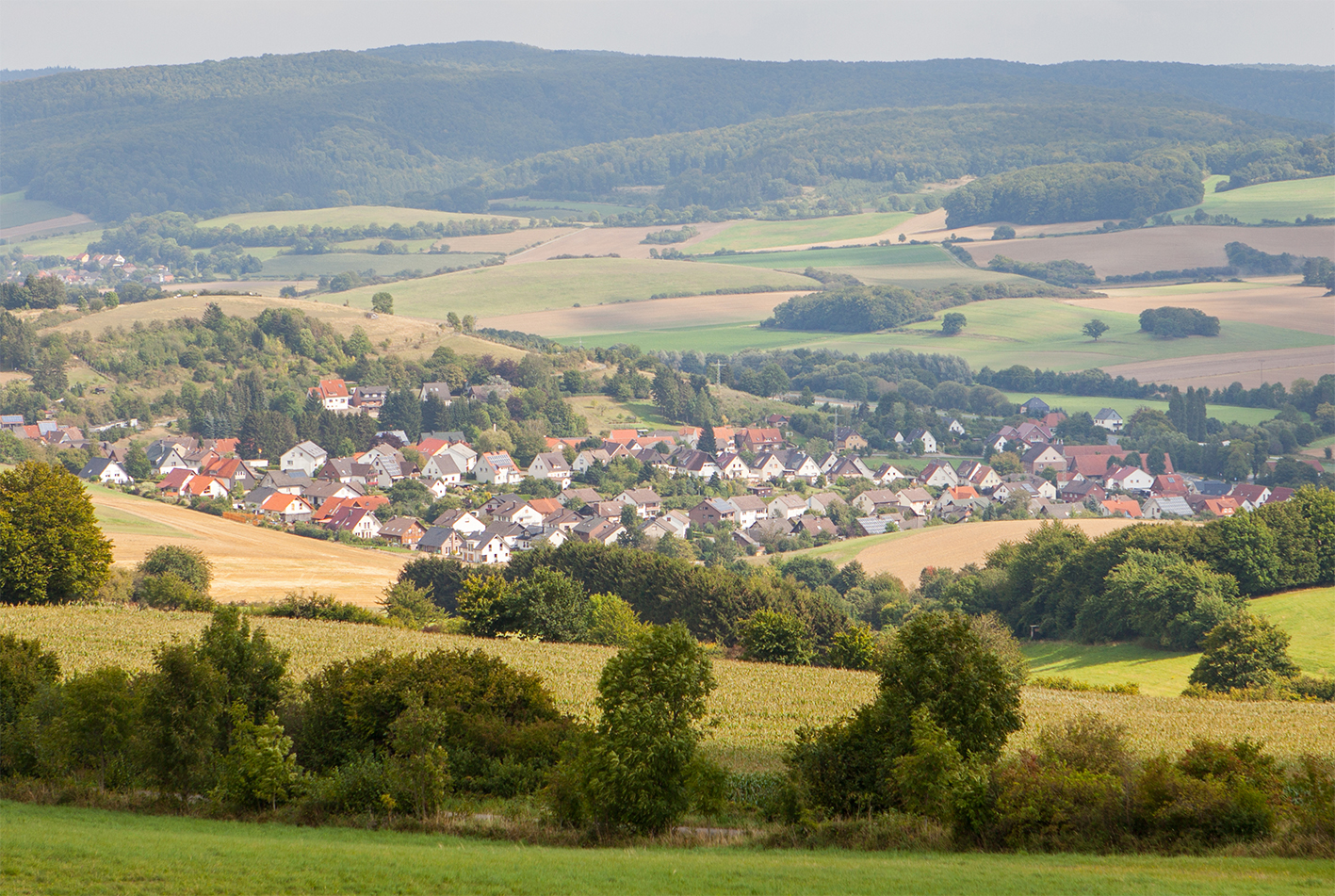 Sonneborn (Barntrup), Kreis Lippe, Ansicht von Westen